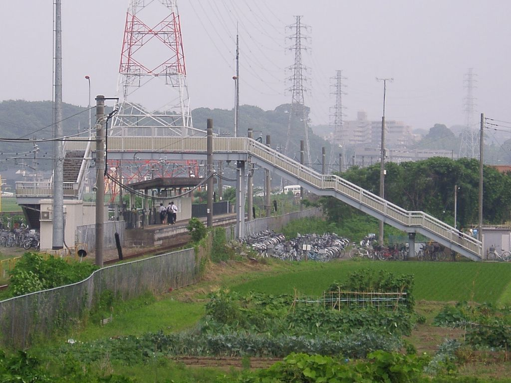 Iriya Station on JR Sagami Line, Zama, Kanagawa 入谷駅 (神奈川県)